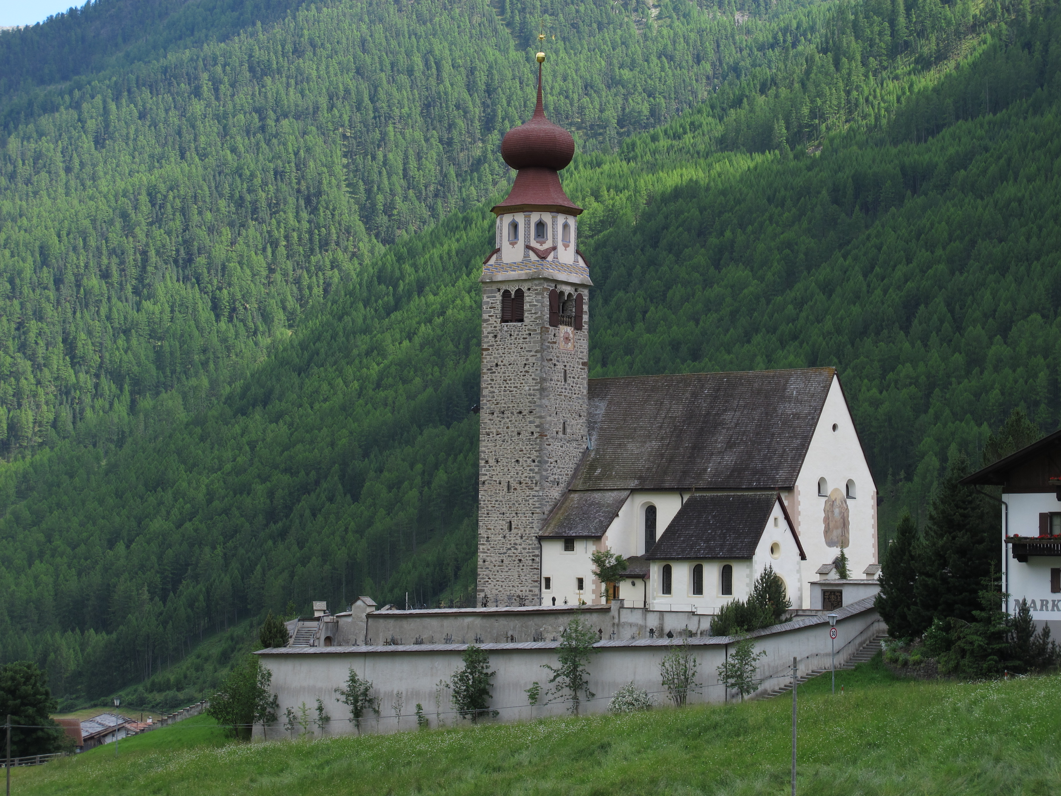 Wallfahrtskirche "Unser Frau im Schnalstal", Südtirol: Außenansicht